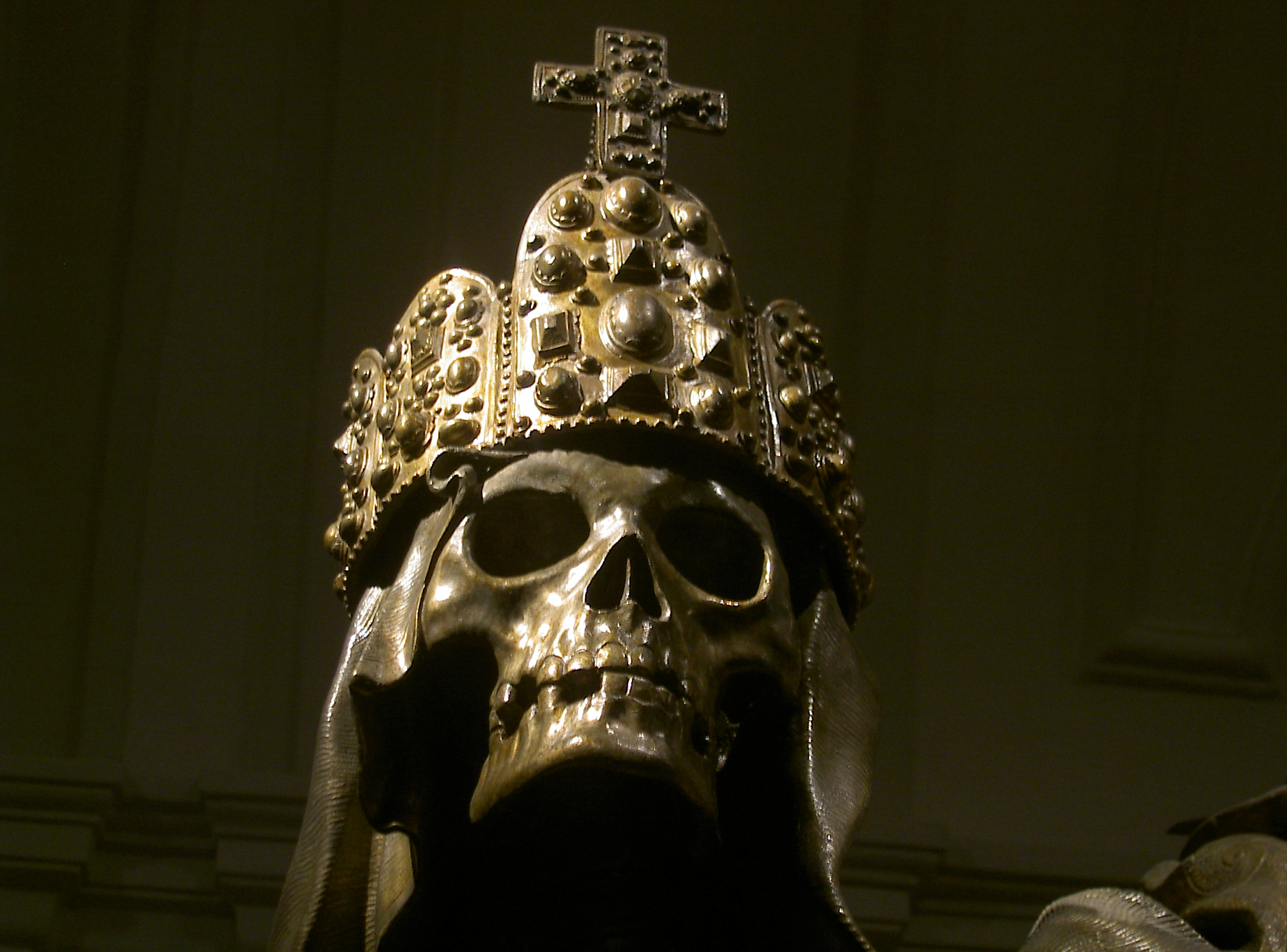 Kapuzinergruft Wien